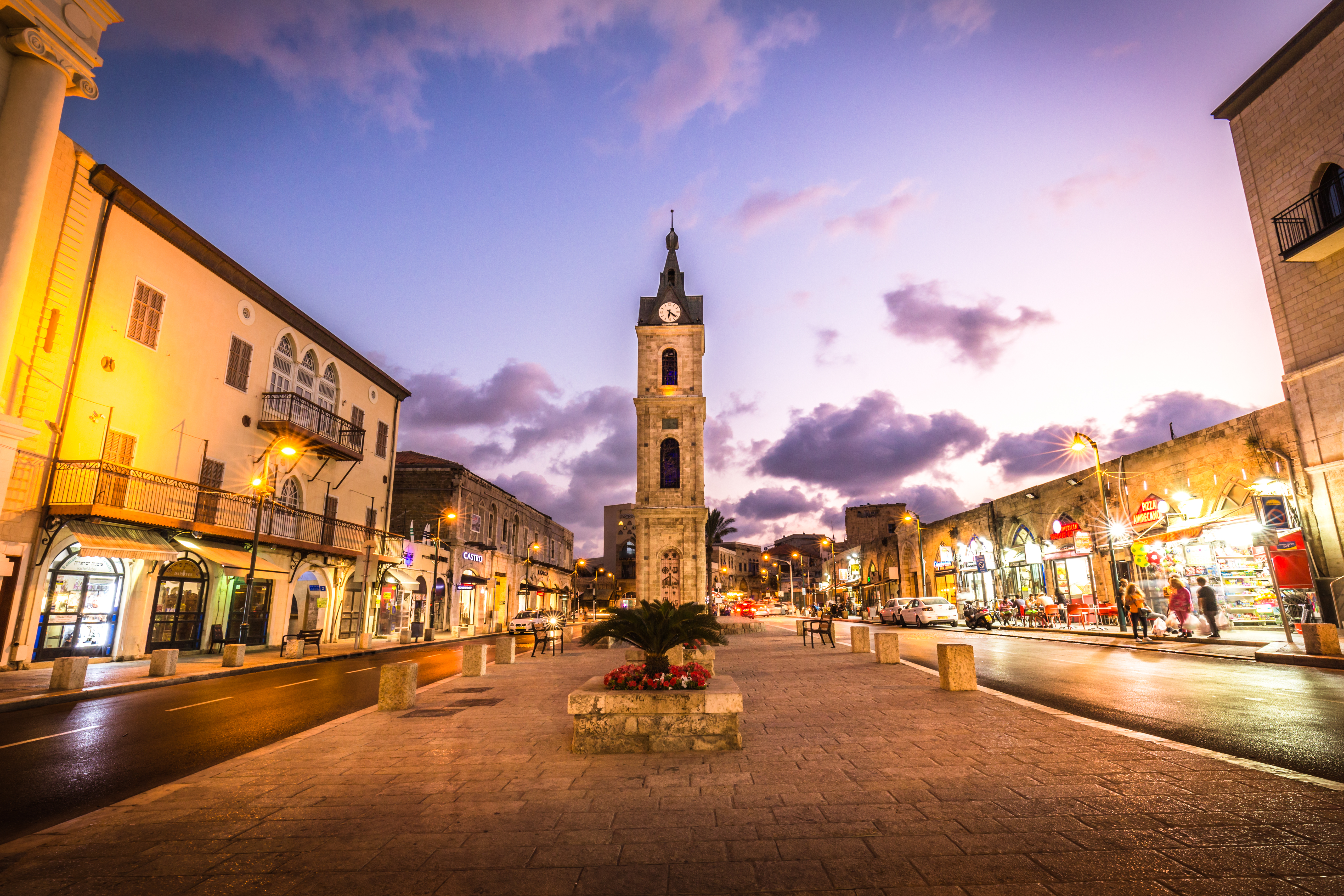 כיכר השעון ביפו